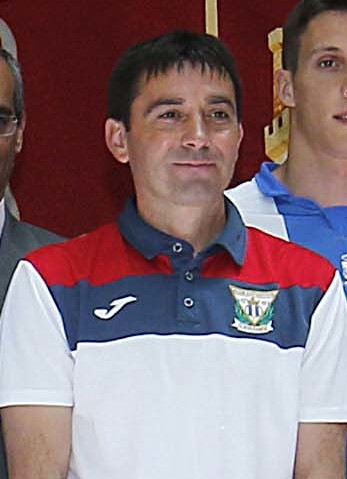 Felicidades pepineros!! Vuestro ascenso a Primera es la historia de un sueño, el resultado de vuestro trabajo y esfuerzo. Sois un orgullo para todo Madrid! Enhorabuena CD Leganés. #LeganésEsDePrimera